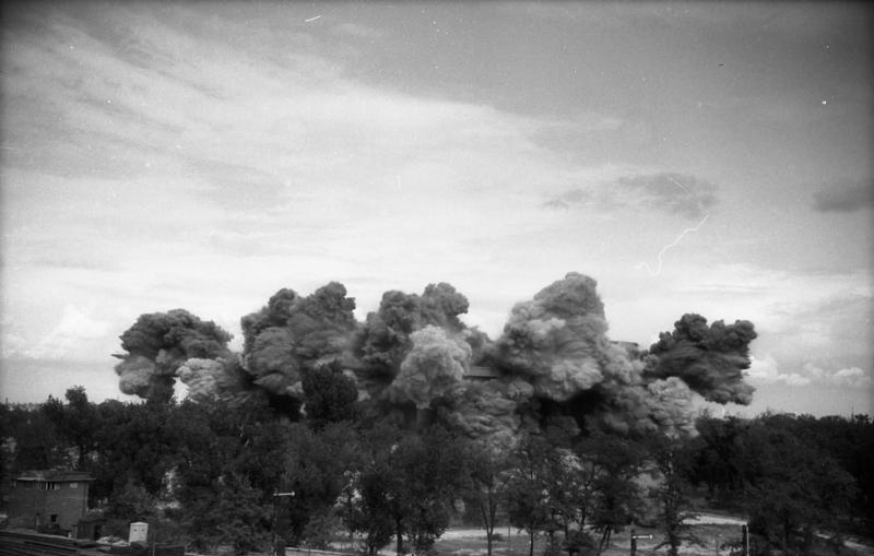 Berlin, Sprengung des Zoobunkers ADN-ZB, Heilig, Berlin, 1947, Der Zoobunker wird gesprengt. 817-47, 4.9.1947